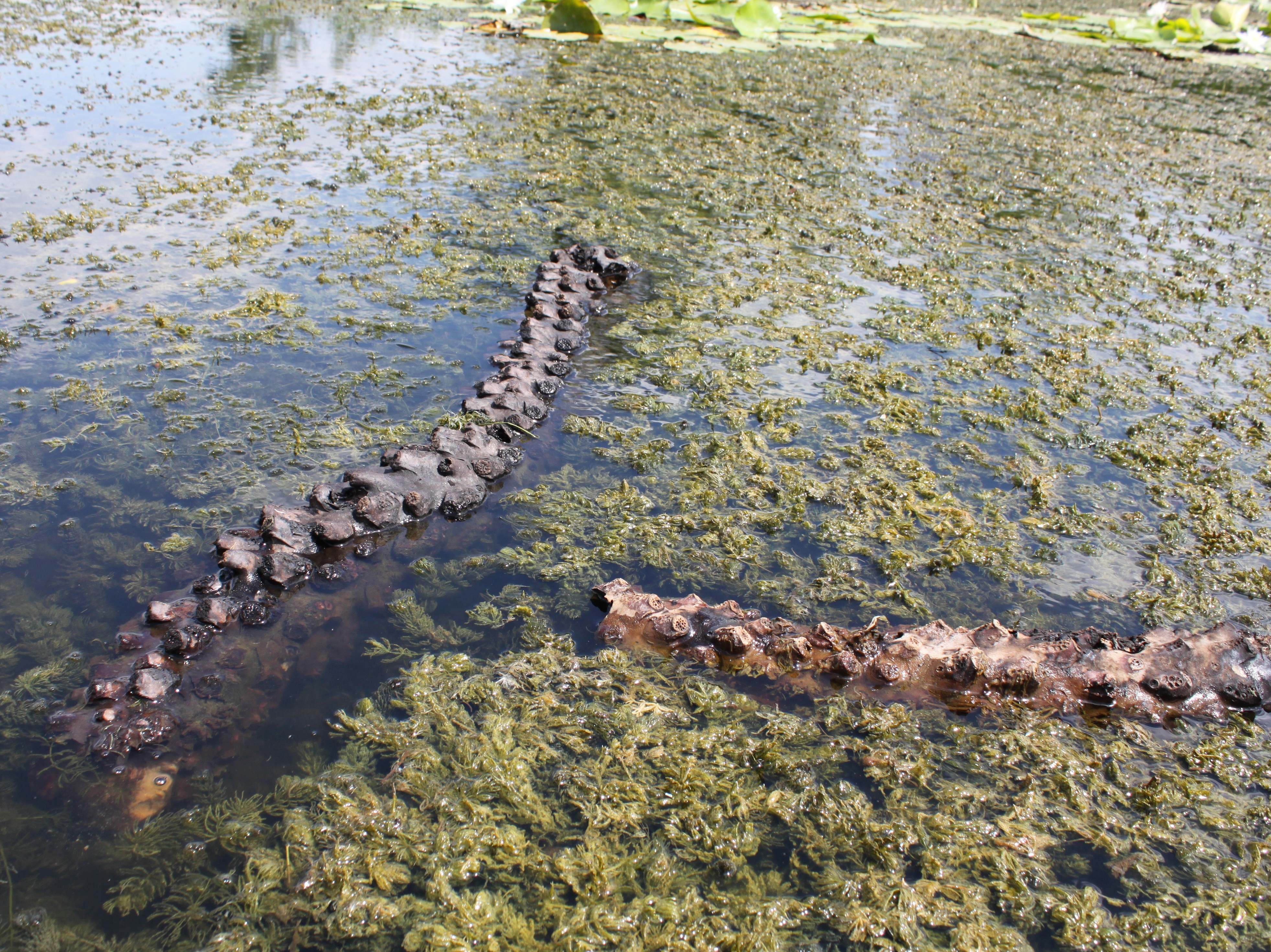 Кореневища латаття білого, р. Дніпро